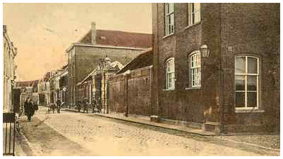 Koloniaal Werfdepot aan de Smeepoortstraat, Gelderse Munt.